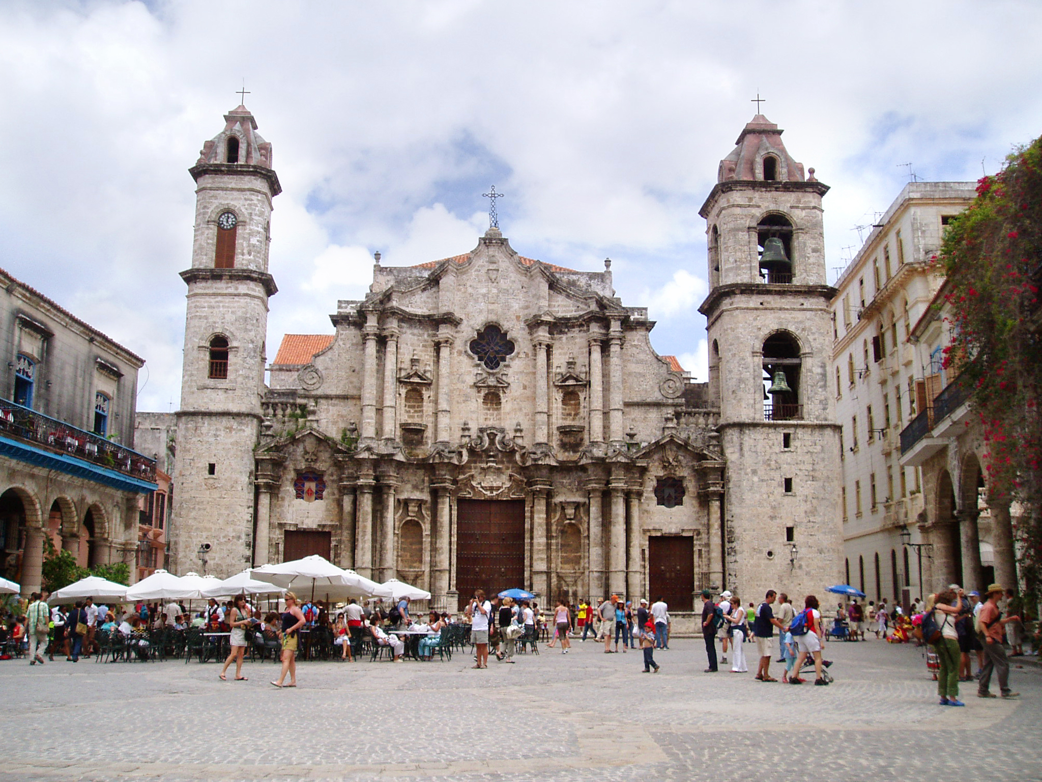 Havana Cathedral ( Catedral de La Habana)